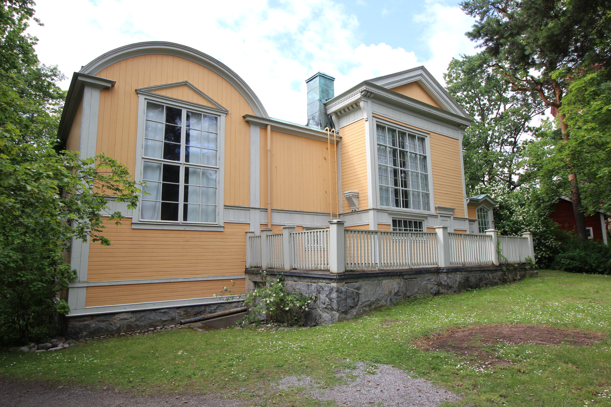 Julius Kornbergs ateljé på Skansen, Stockholm. Ursprungligen på Lilla Skuggan (Heleneberg), Norra Djurgården